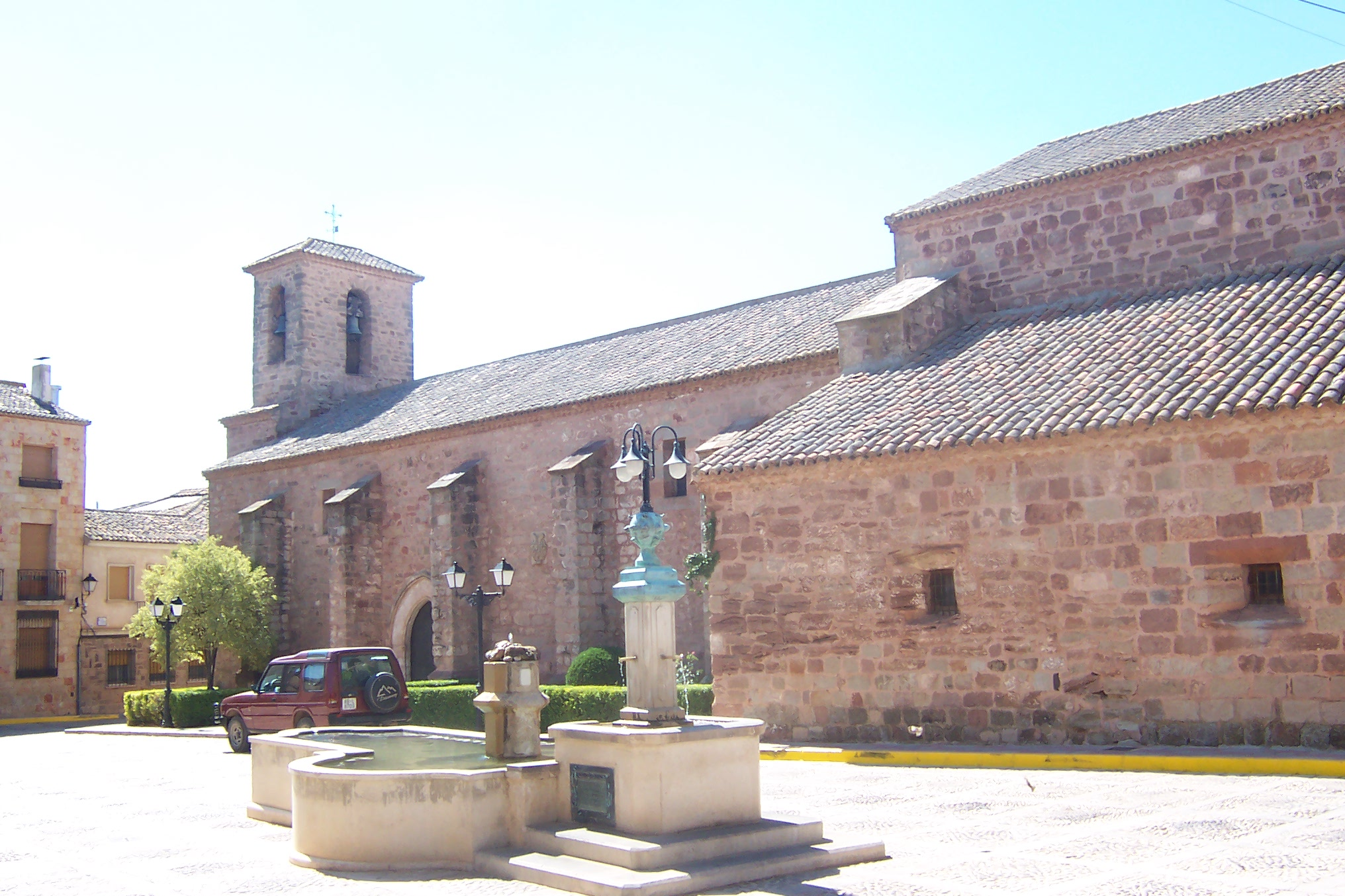 Iglesia Parroquial de San Sebastián en Villapalacios (Albacete)